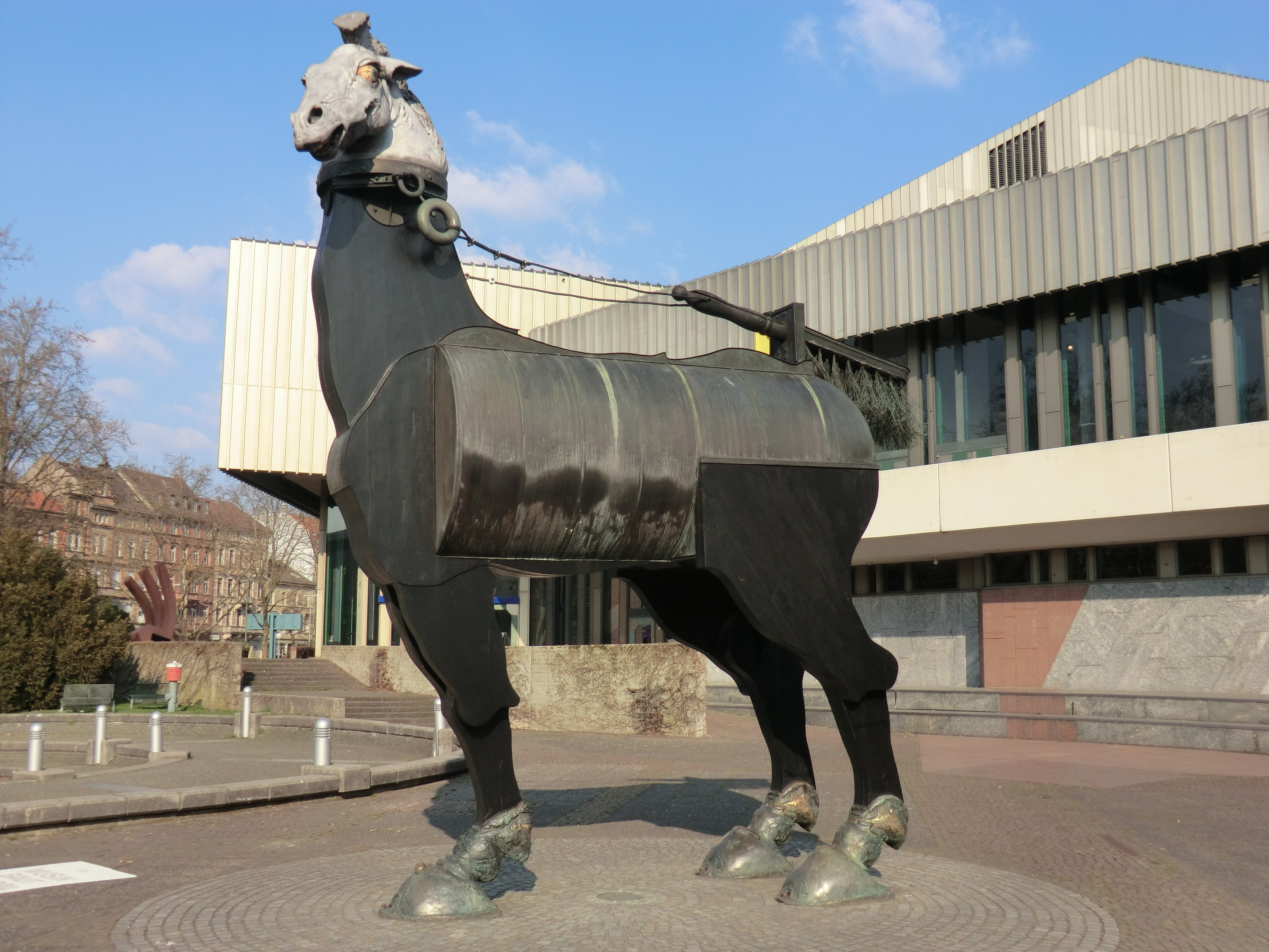 Musengaul vor dem Badisches Staatstheater in Karlsruhe